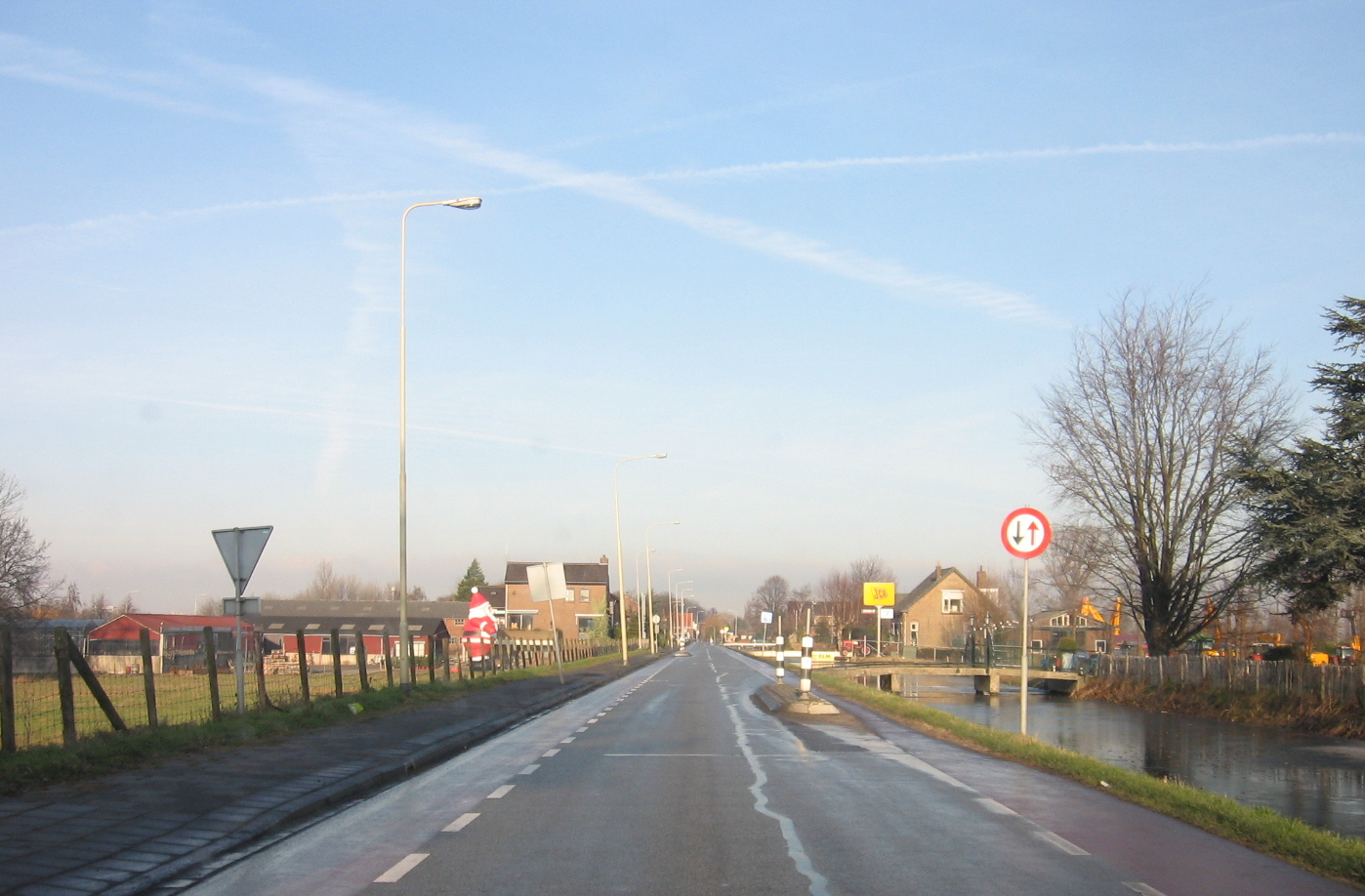 gehucht Kruisweg